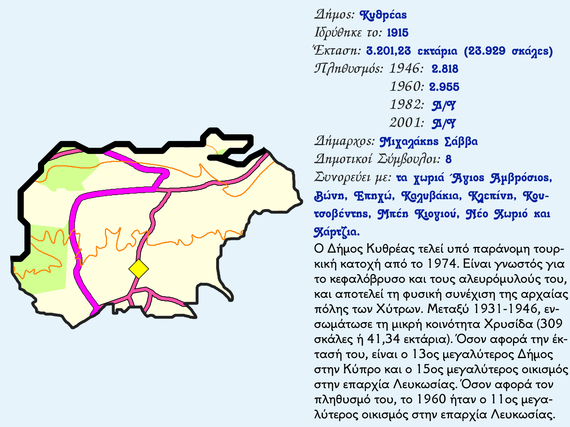 Συνοπτική παρουσίαση της Κυθρέας